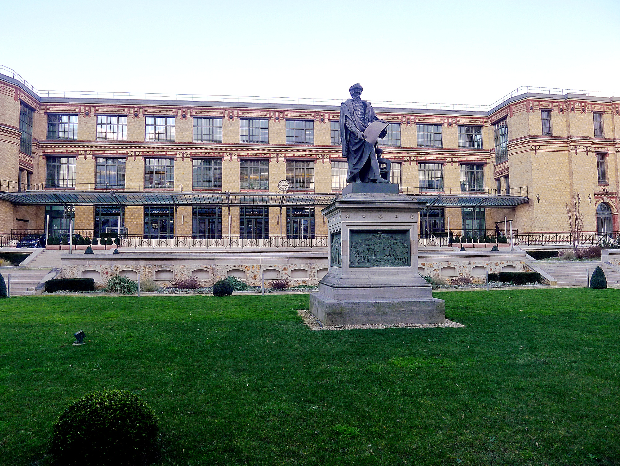 Rue de la Convention (n°27 : ancienne imprimerie nationale) - Paris XV